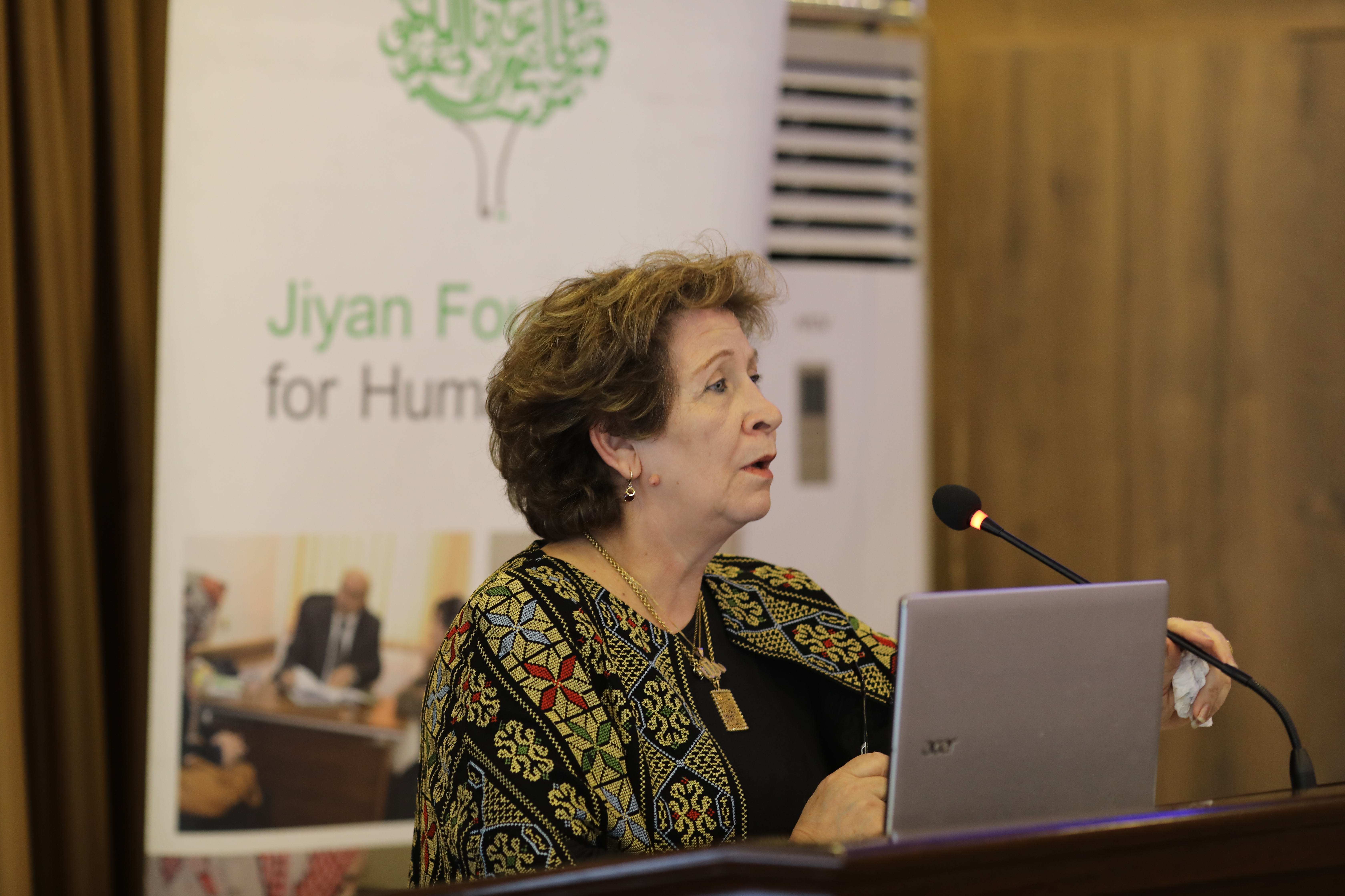 کوردی: وتاری ئیمان عابد رامین لە مەراسیمی ڕاگەیاندنی هاوپەیمانی بۆ قەرەبووکردنەوەی دادپەروەرانە بە فەرمی